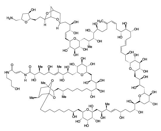 Fórmula Estrutural da Palitoxina (Palytoxin - C128H221N3O54).